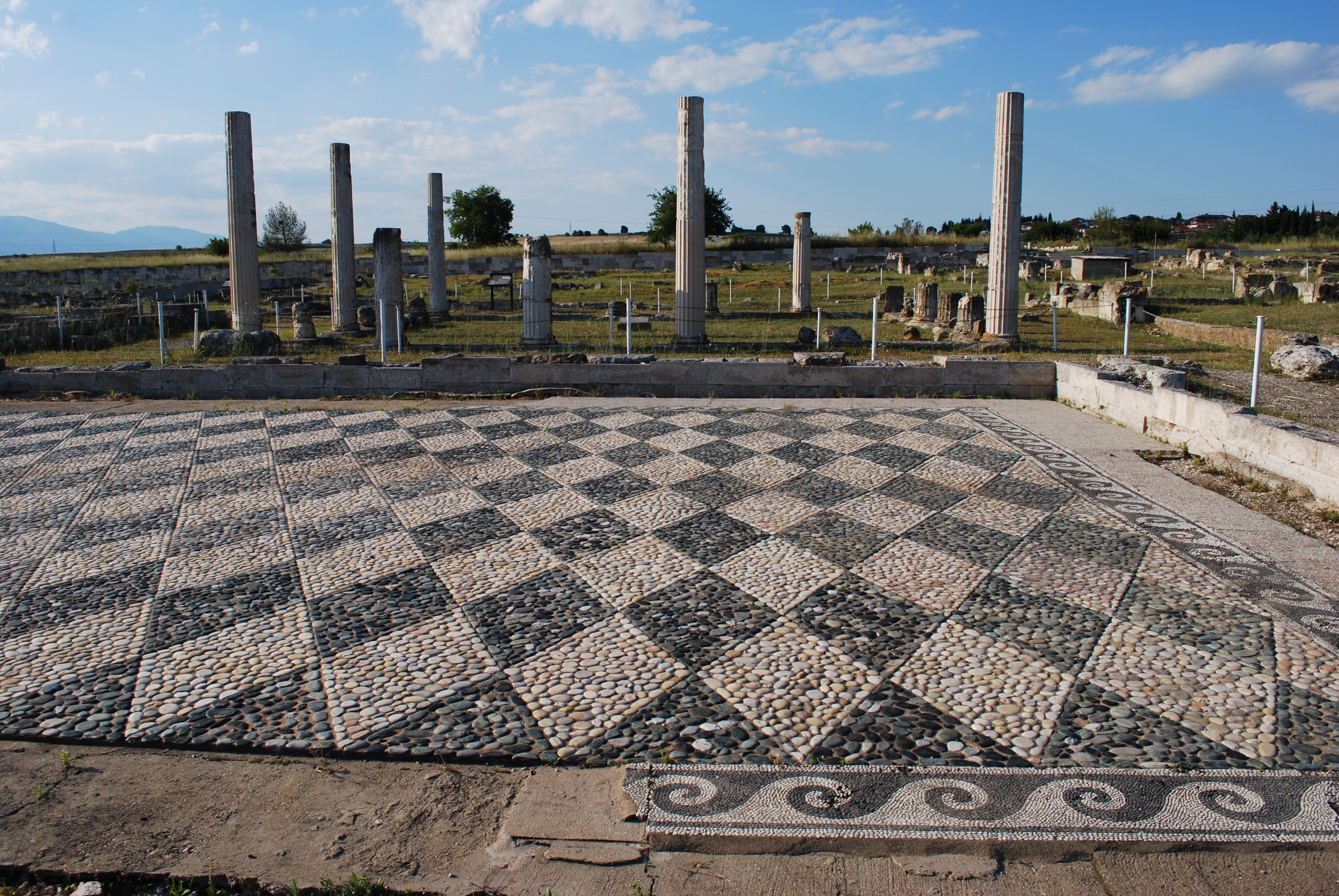 Vue du site archéologique de Pella.